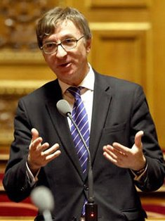 Portrait du sénateur Bernard Fournier au Sénat